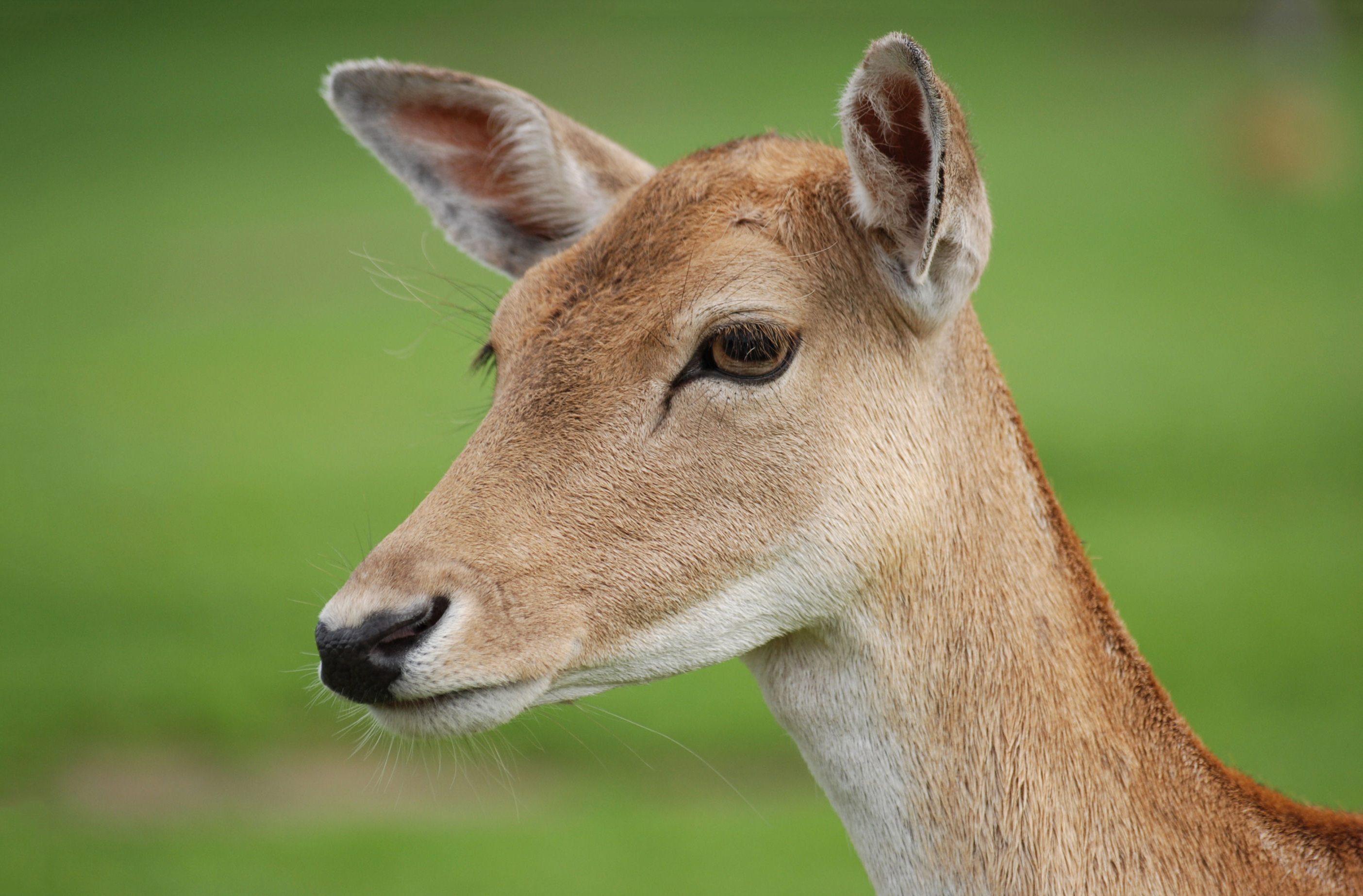 Dama dama in Kadzidłowo